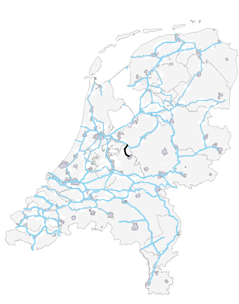 locatie Eem